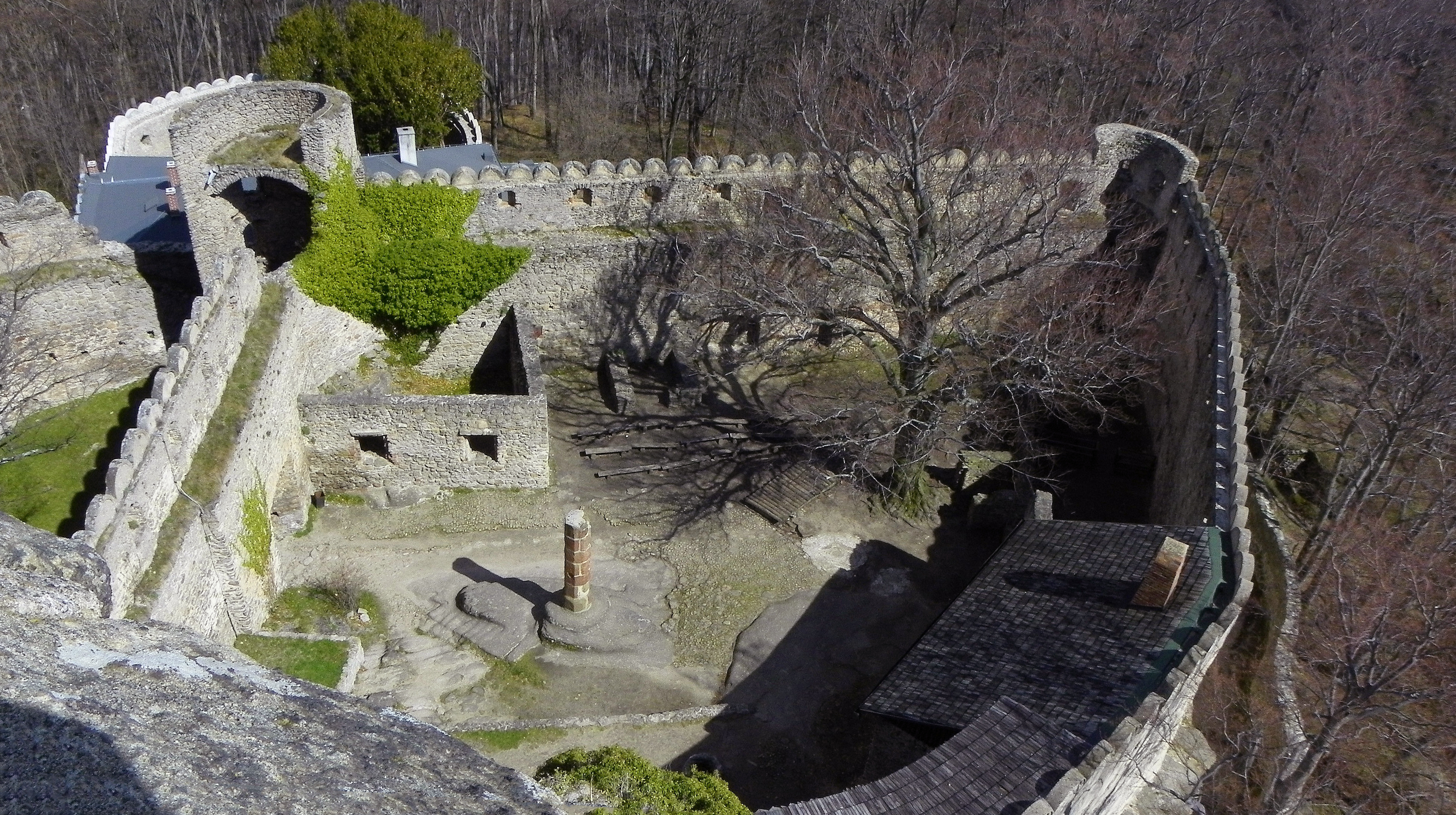 Zamek Chojnik województwo dolnośląskie, widok dziedzińca z wieży.